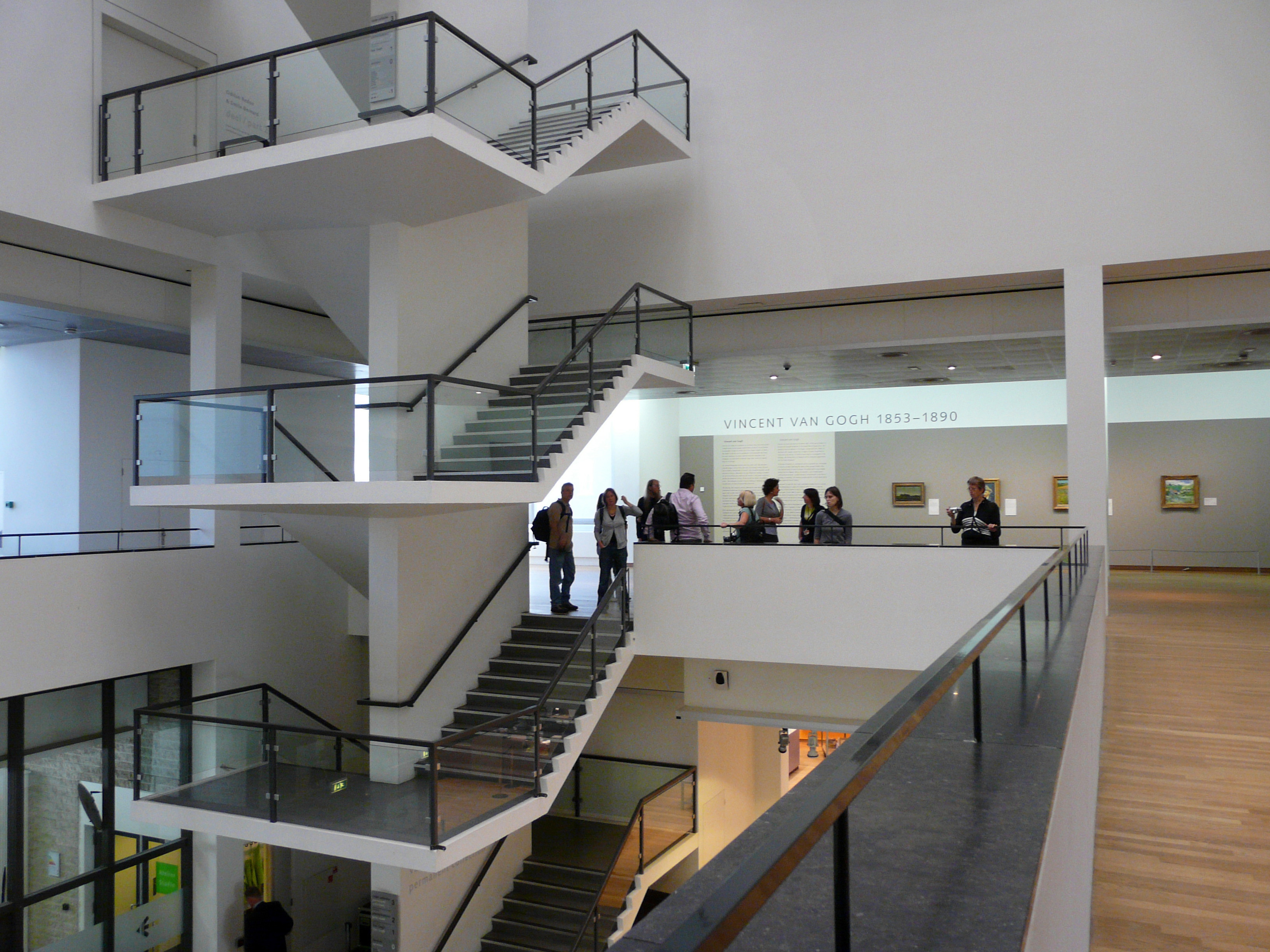 Staircase Van Gogh Museum Amsterdam Foto gemaakt tijdens wiki loves art nl exclusieve fotosessie in het van Gogh Museum in Amsterdam op 23 juni 2009. Photo taken during Wiki Loves Art Netherlands exclusive photo session in the Van Gogh Museum in Amsterdam on 23 June 2009.